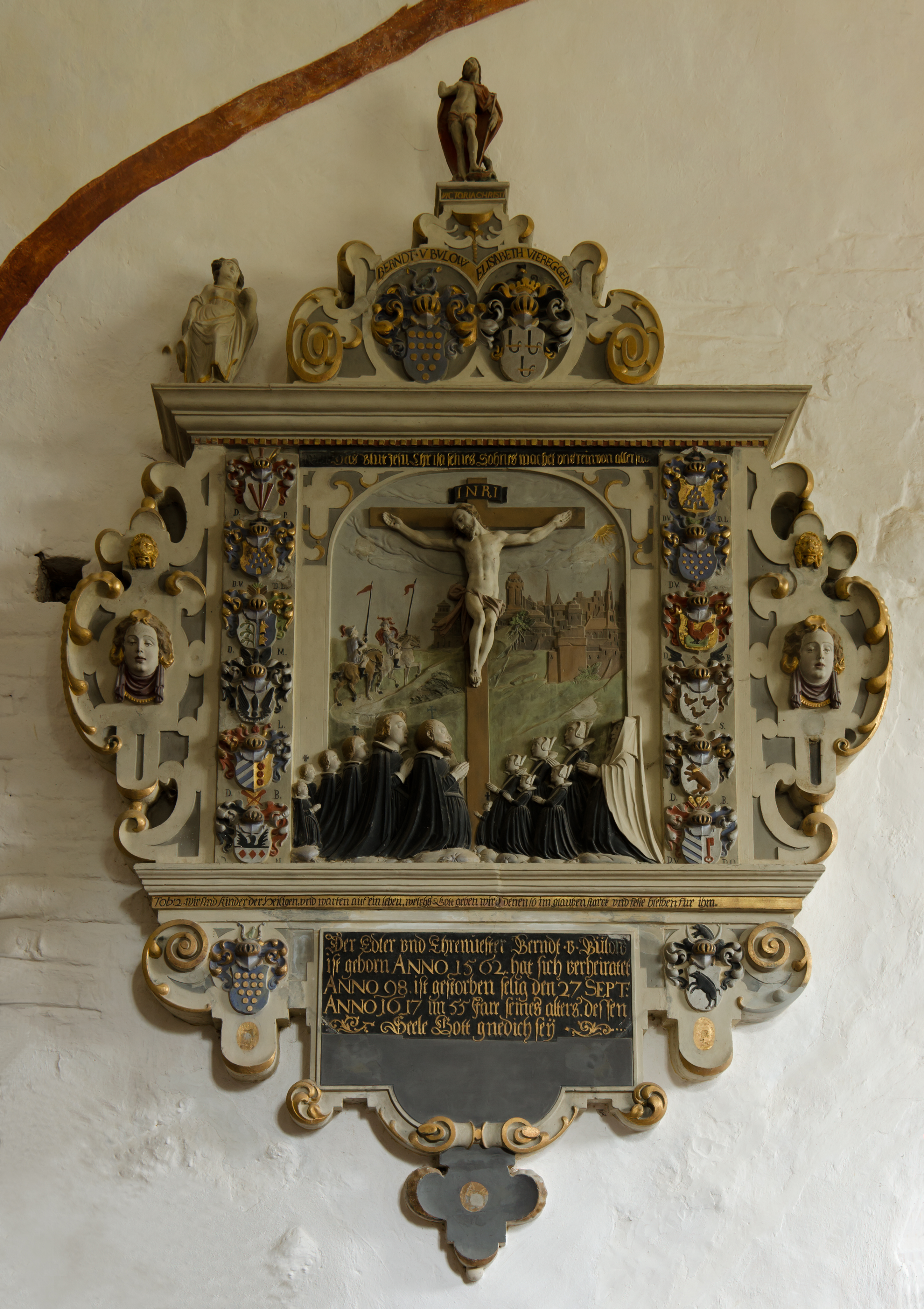 Kirche Heiligenhagen Epitaph von Berndt von Bülow und Frau Elisabeth Viereggen